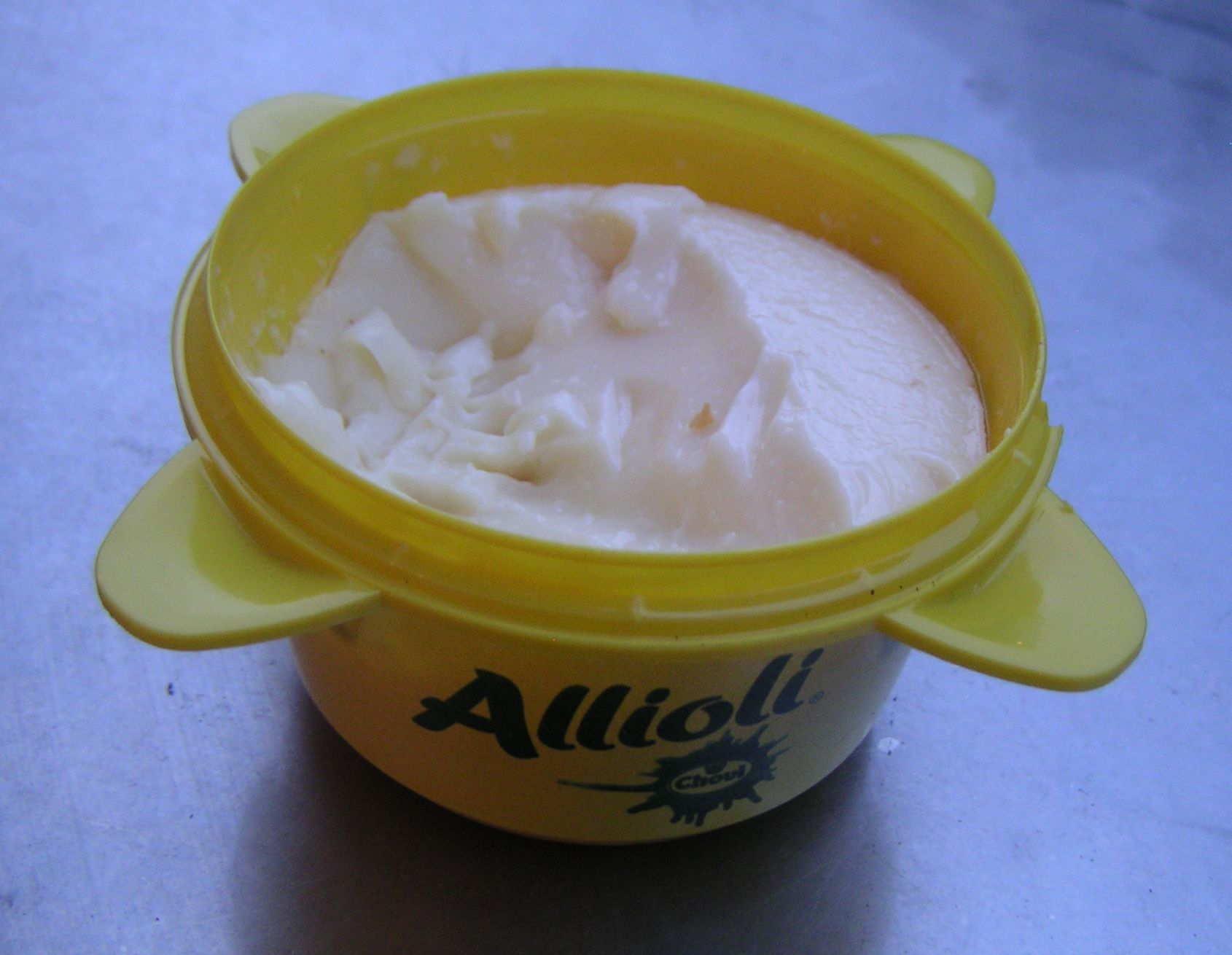 L'allioli se sol fer casolà, però també es ven envasat. A la imatge es veu un allioli venut envasat i ja preparat. Per a mirar que mantingui la tradició, s'ha optat per un envàs que simula el morter clàssic típic català.